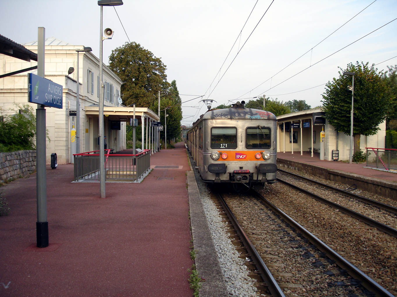 Gare d'Auvers-sur-Oise (Val-d'Oise), France